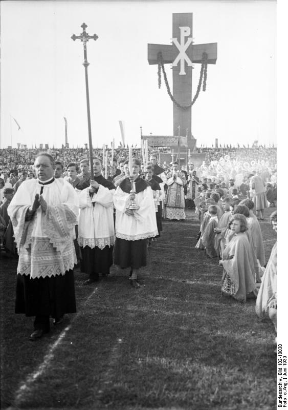 Der grosse märkische Katholikentag im Berliner Stadion! Der päpstliche Nuntius in Berlin, Monsignore Cesare Orsenigo, zelibrierte persönlich vor über 50tausend Menschen die heilige Messe. Der feierliche Zug, inmitten der päpstliche Nuntius Monsignore Cesare Orsenigo, bewegt sich durch das Stadion. Im Hintergrund der Altar mit dem 15 m hohen Kreuz.